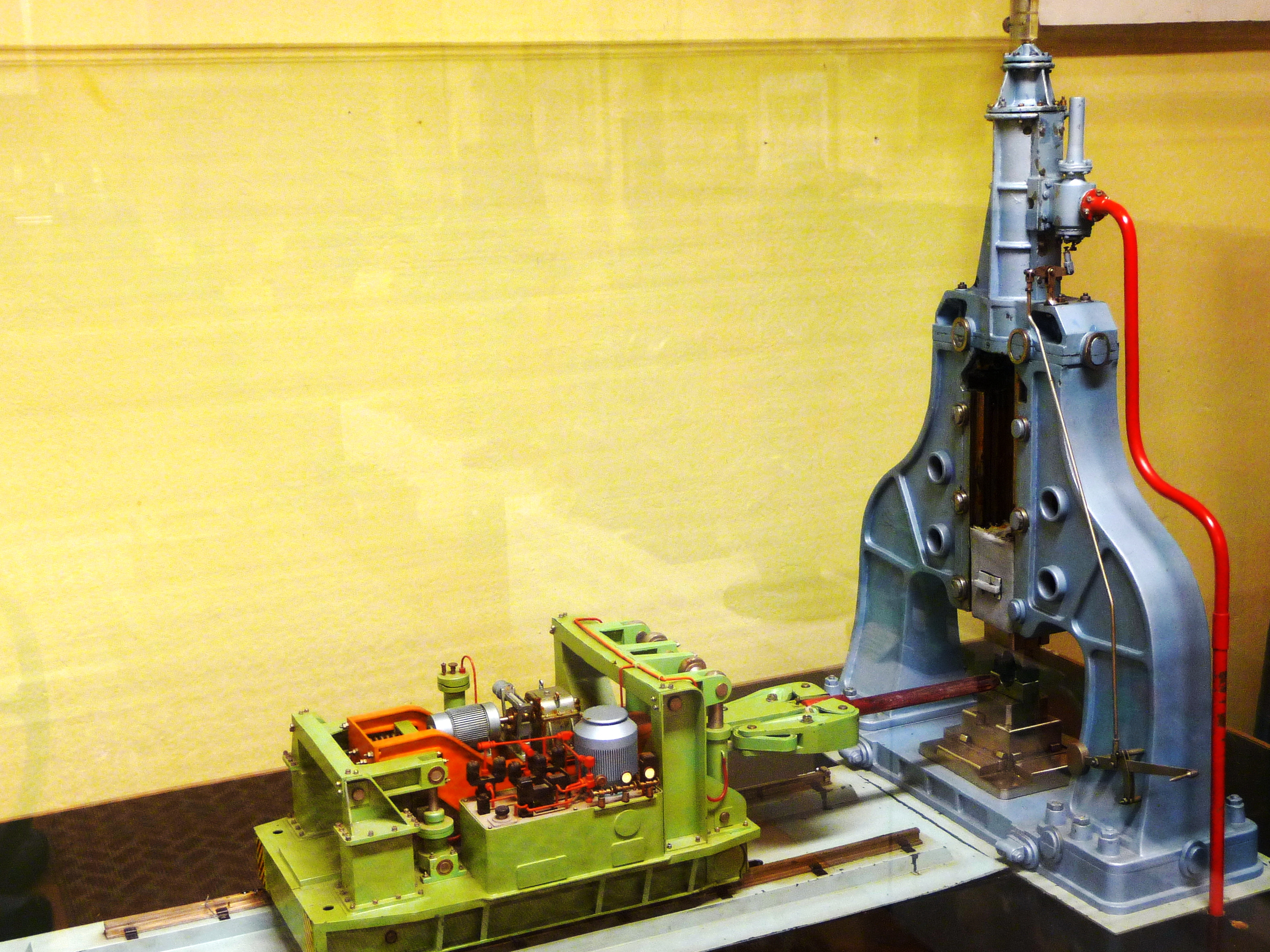 Manipulátoros kovácsolópép makettje a Kohászati Múzeumban, Miskolcon